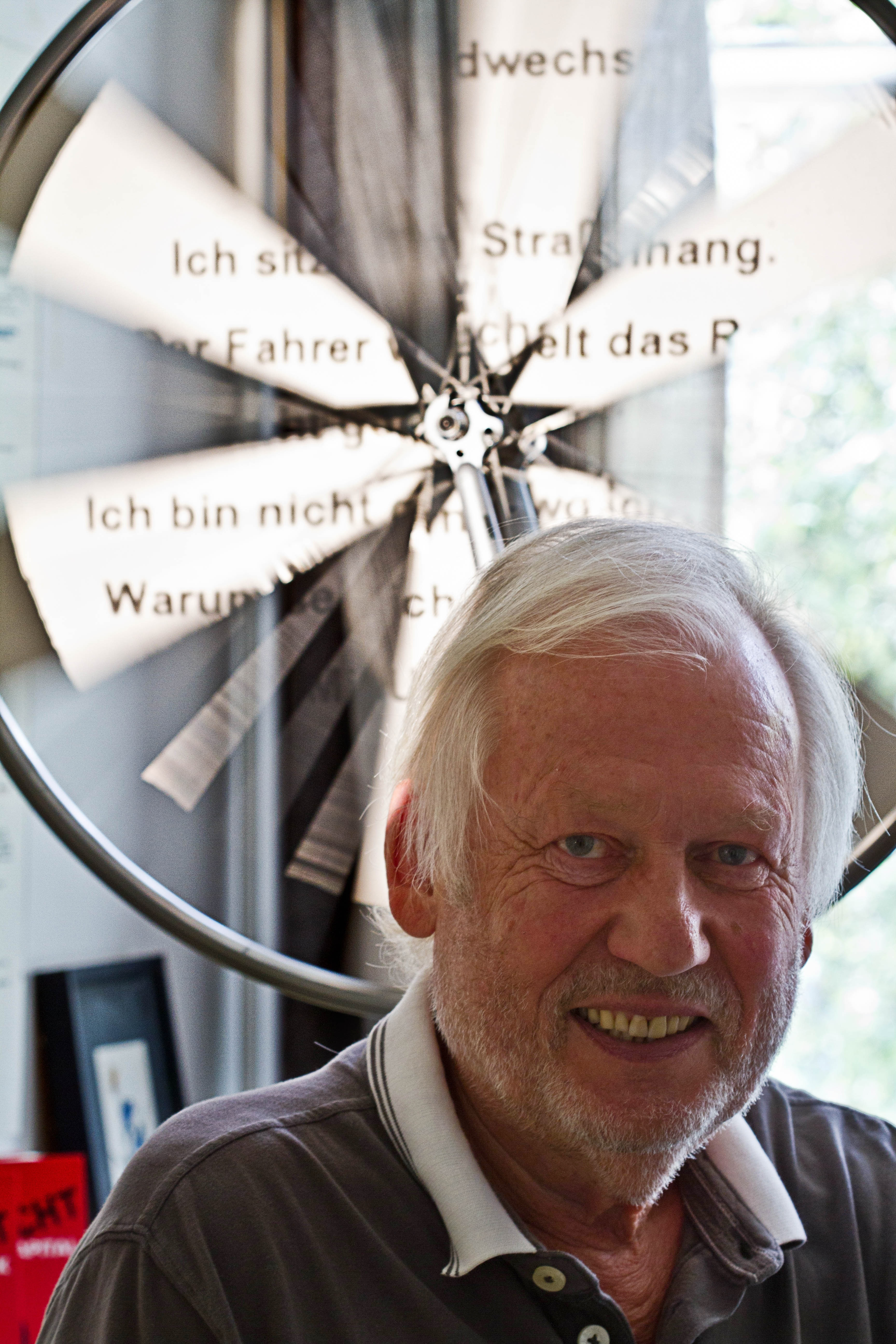 Portrait Jan Knopf